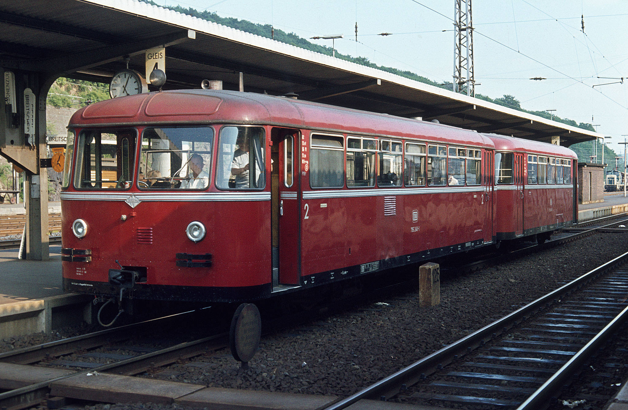 Der später Museumstriebwagen 795 240 der Deutschen Bundesbahn, hier noch im Planeinsatz. Als Nahverkehrszug nach Breitscheid steht er am 29.05.1978 abfahrbereit im Bahnhof Dillenburg.